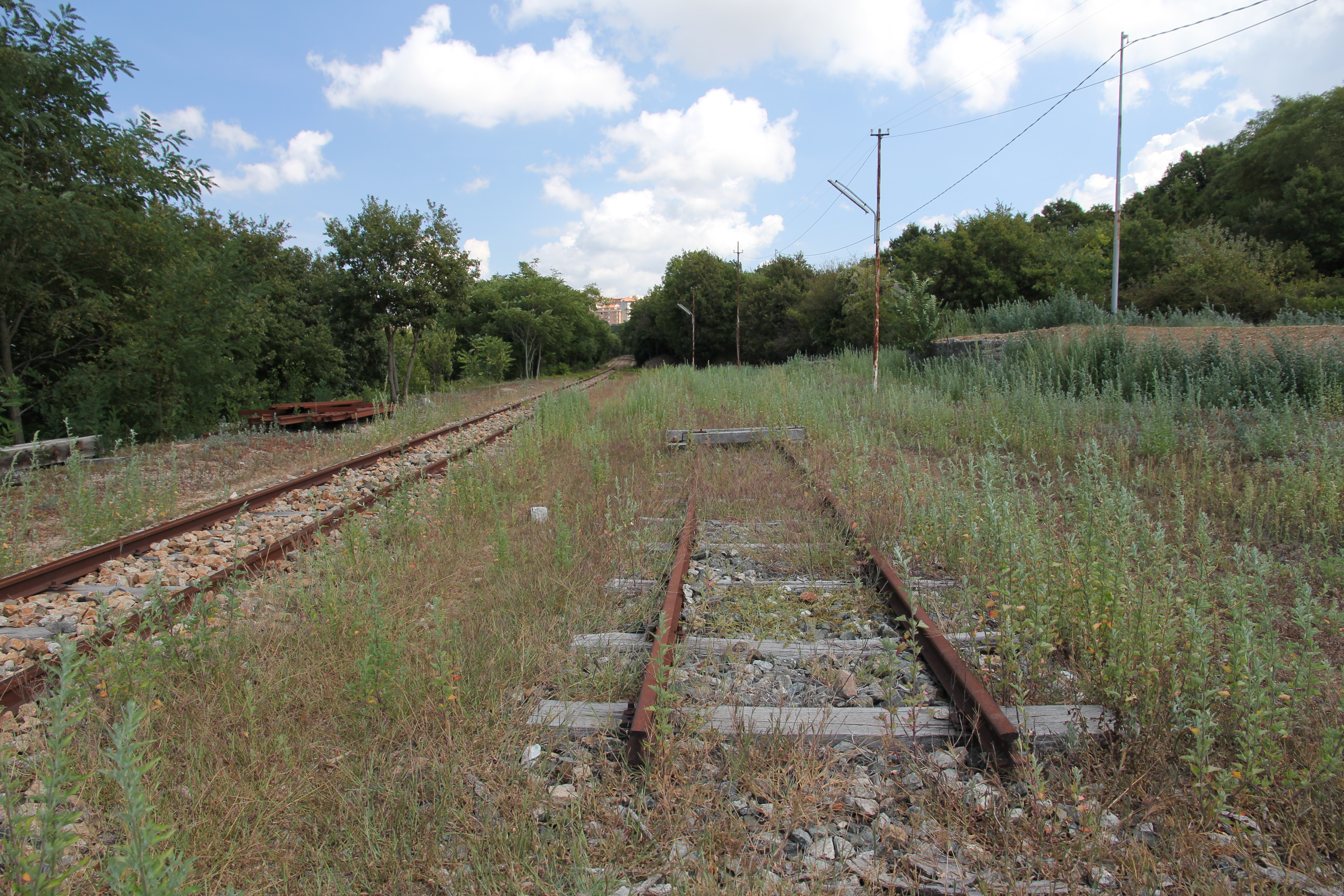 Aggius - Stazione ferroviaria